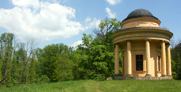 Česky: Pavilon "Přátel venkova a zahrad" ve Veltrusech